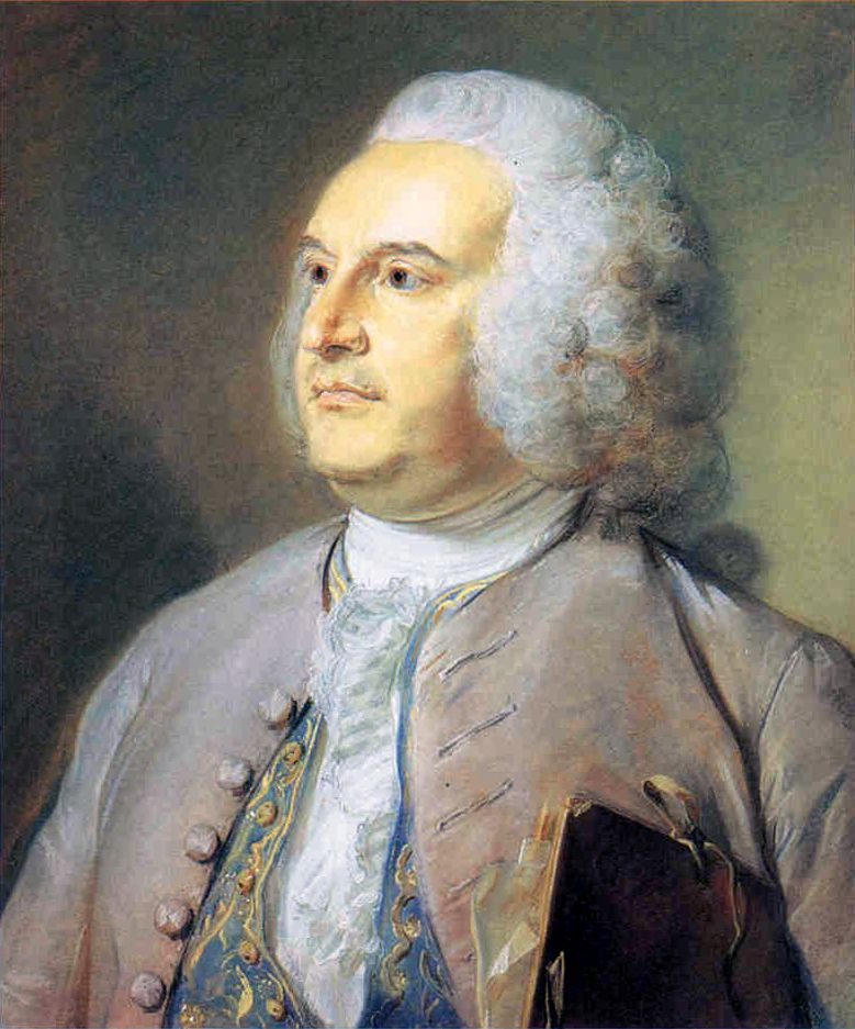 Jean-Michel Chevotet